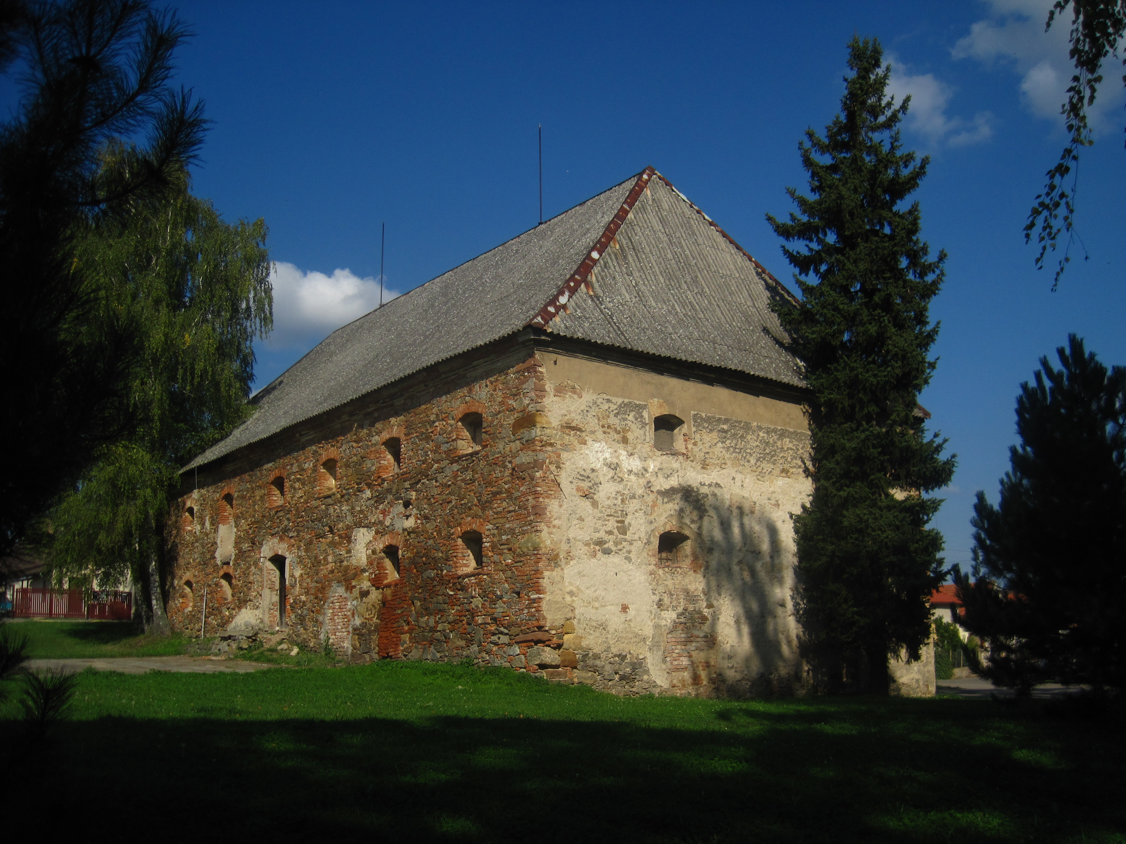 Plaňany - tzv. Mírkovská tvrz v ulici Pode Dvorem